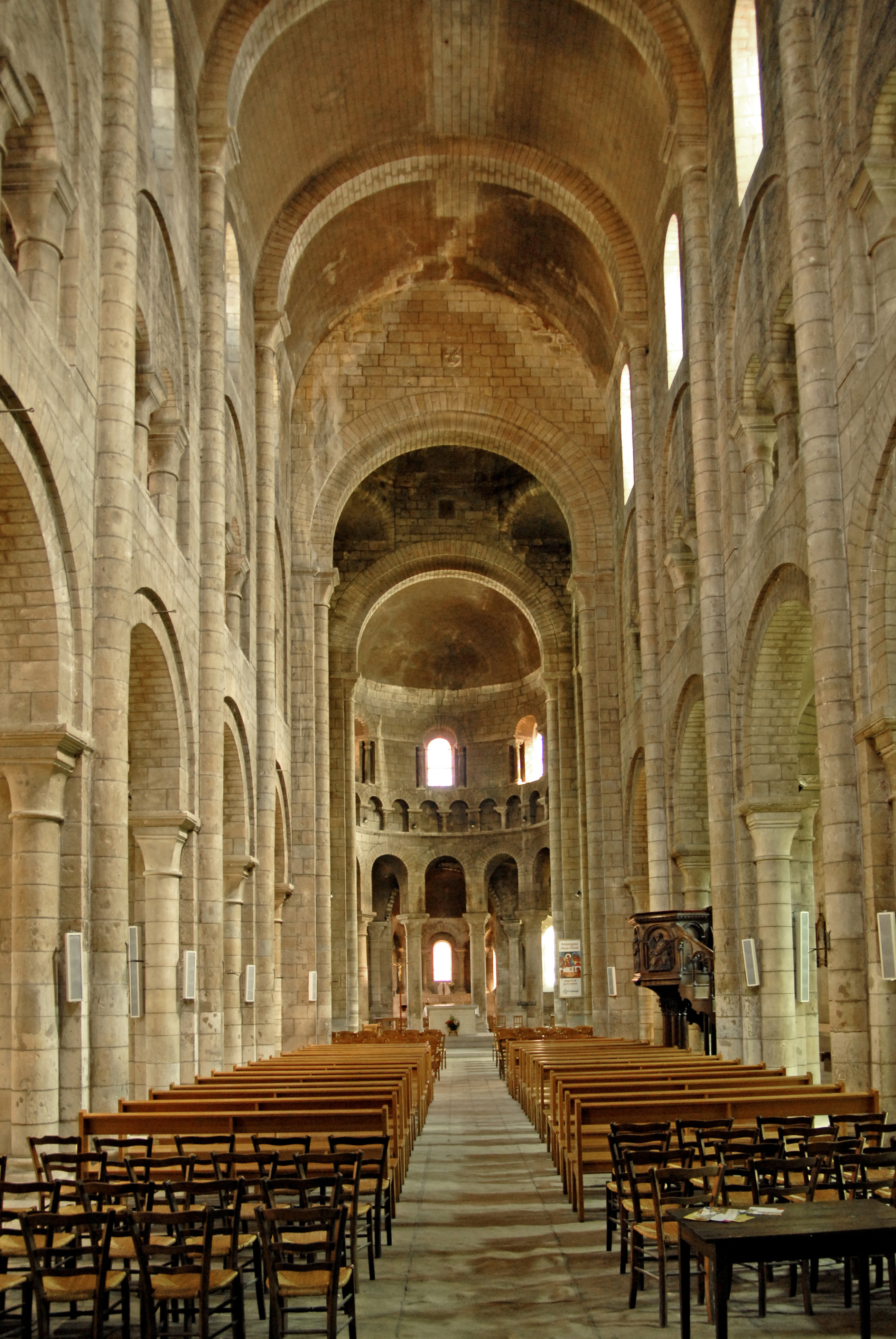 St.-Etienne Nevers, Mittelschiff